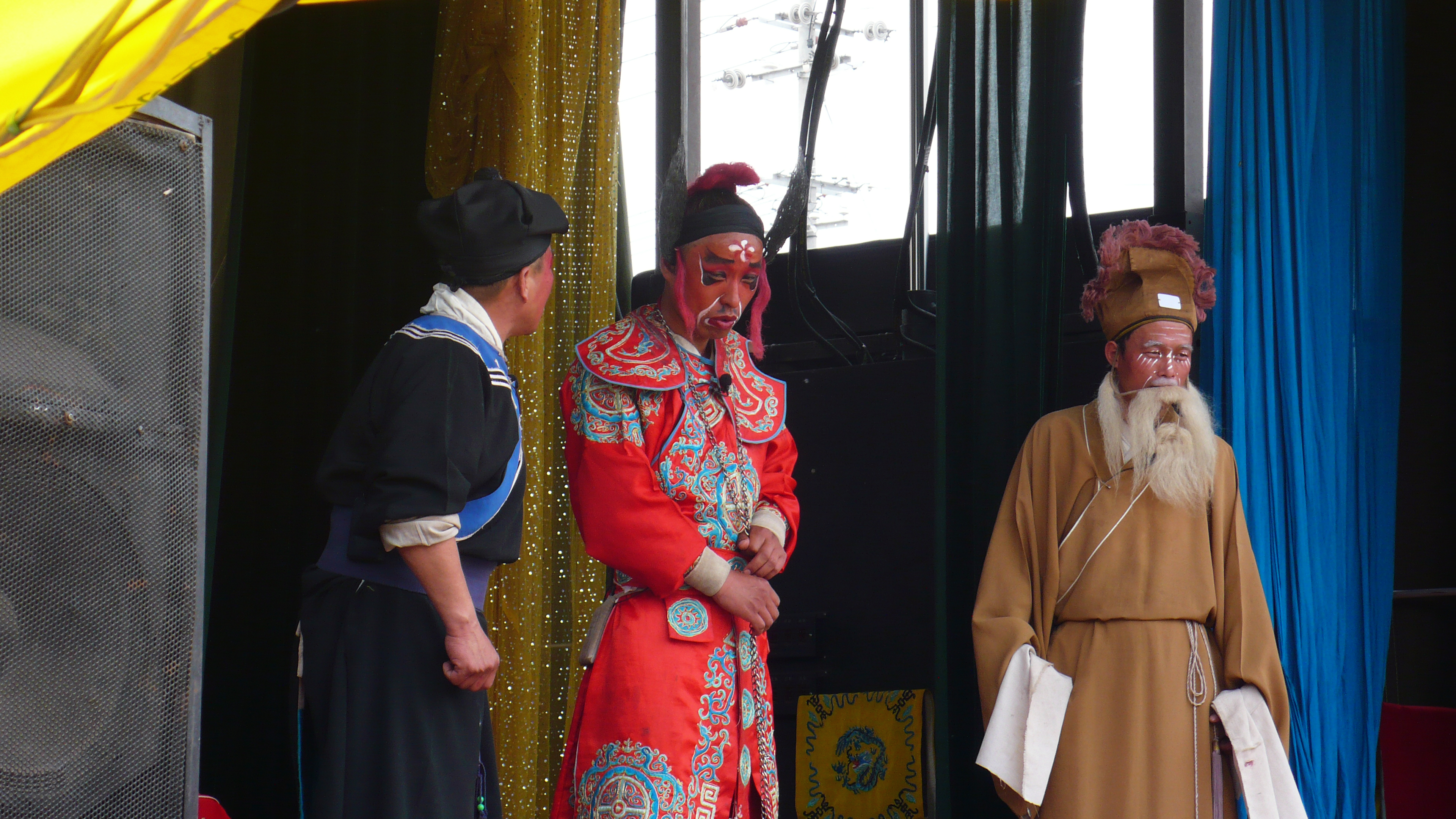 中文（中国大陆）: 蒲州梆子《金水桥》。山西临汾青年蒲剧团演出。